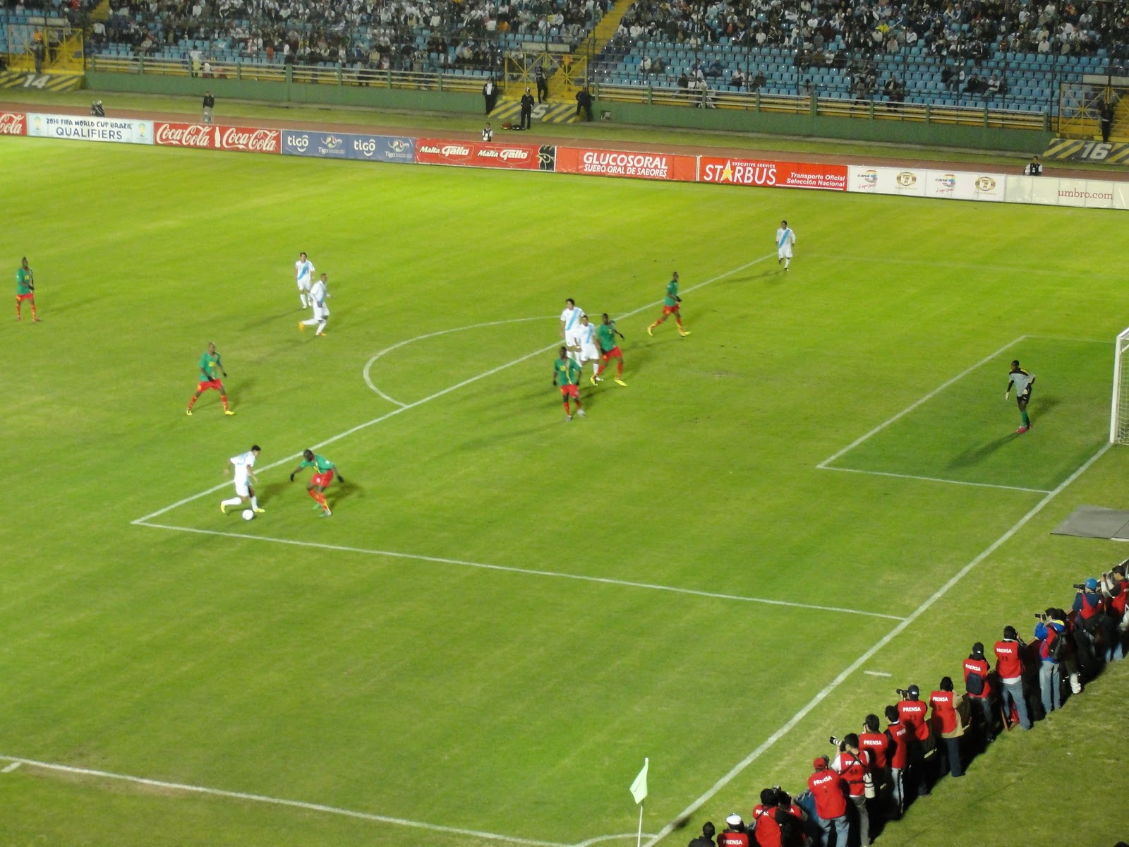 Partido entre la Guatemala y Granada. Eliminatoria hacia Brasil 2014